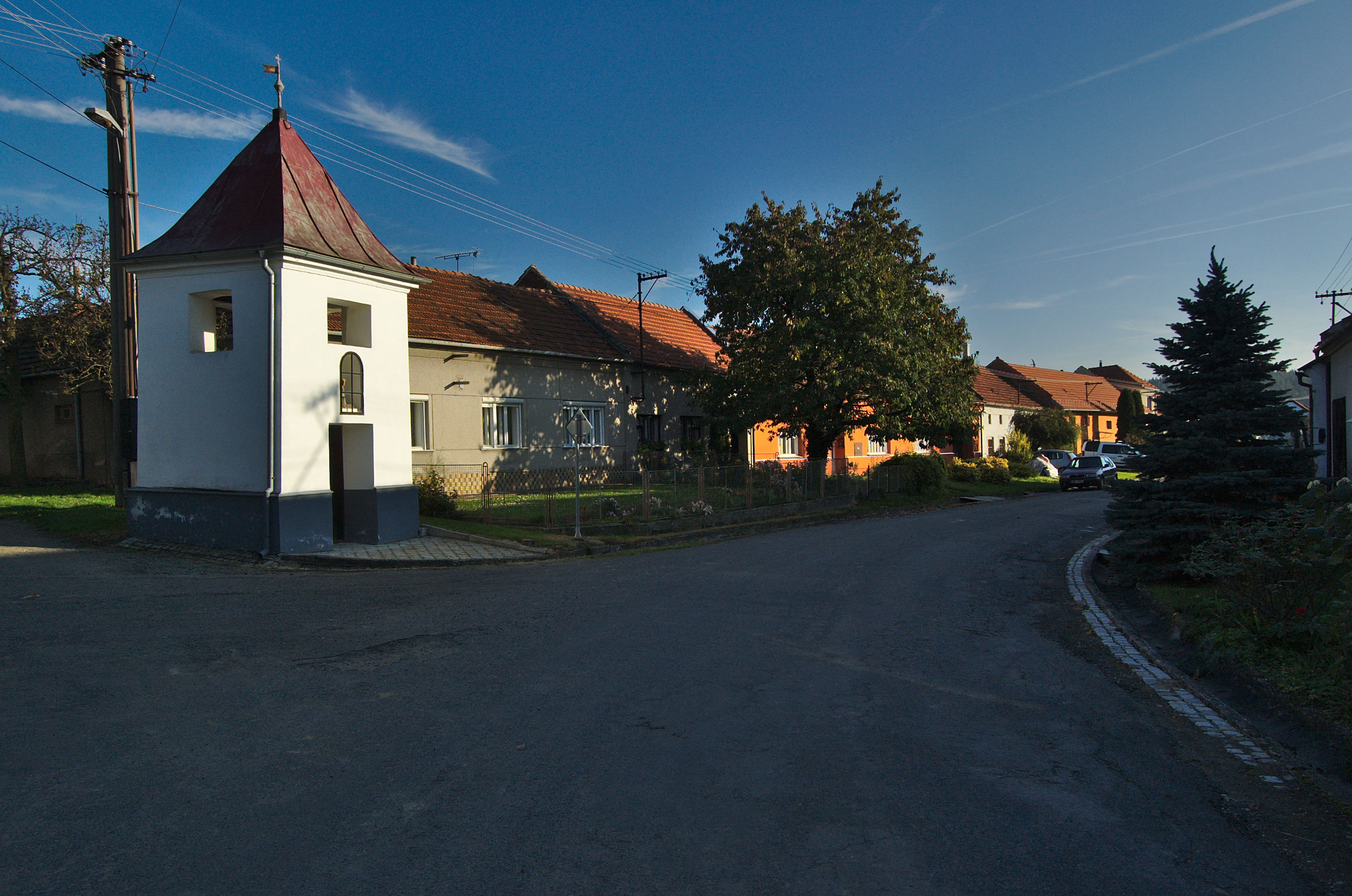 Zvonice na návsi, Kobylničky, Myslejovice, okres Prostějov